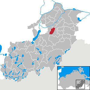 Pragsdorf in Mecklenburg-Vorpommern, Landkreis Mecklenburg-Strelitz